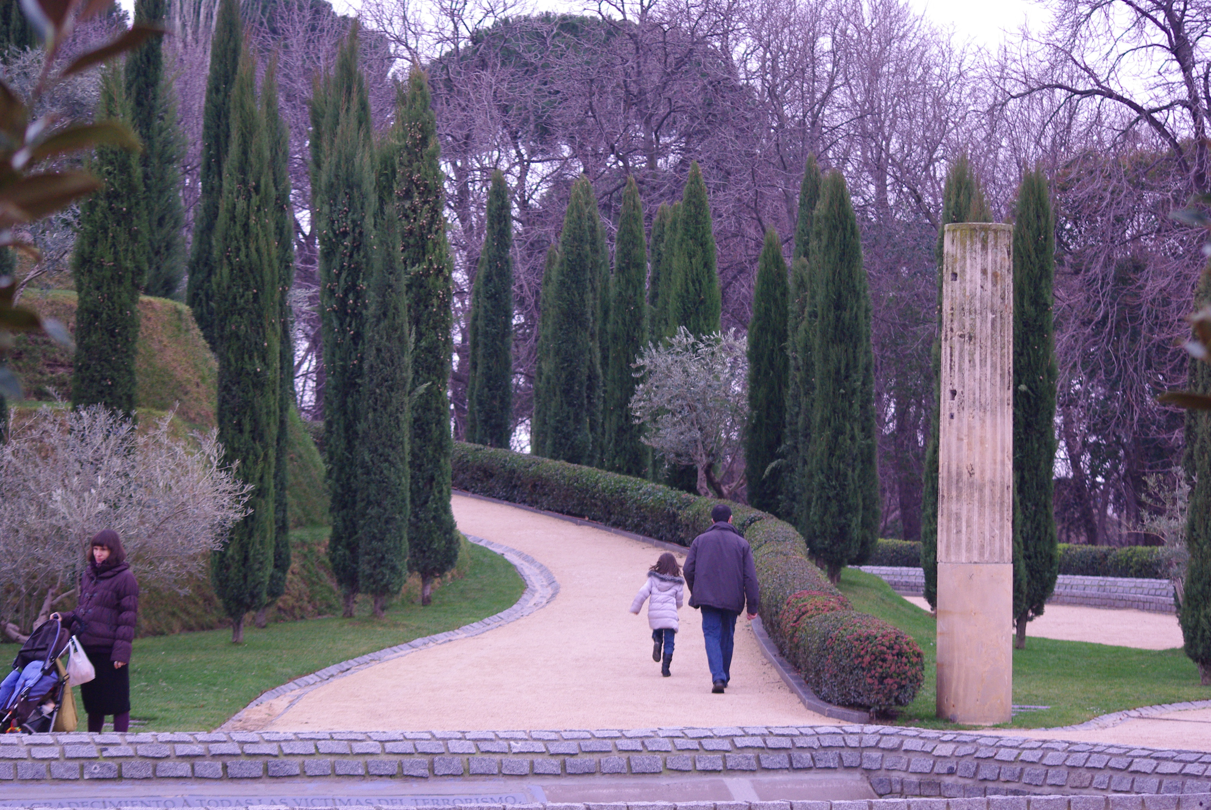 Monumento a los ausentes. Monumento en recuerdo de las víctimas del 11-M.